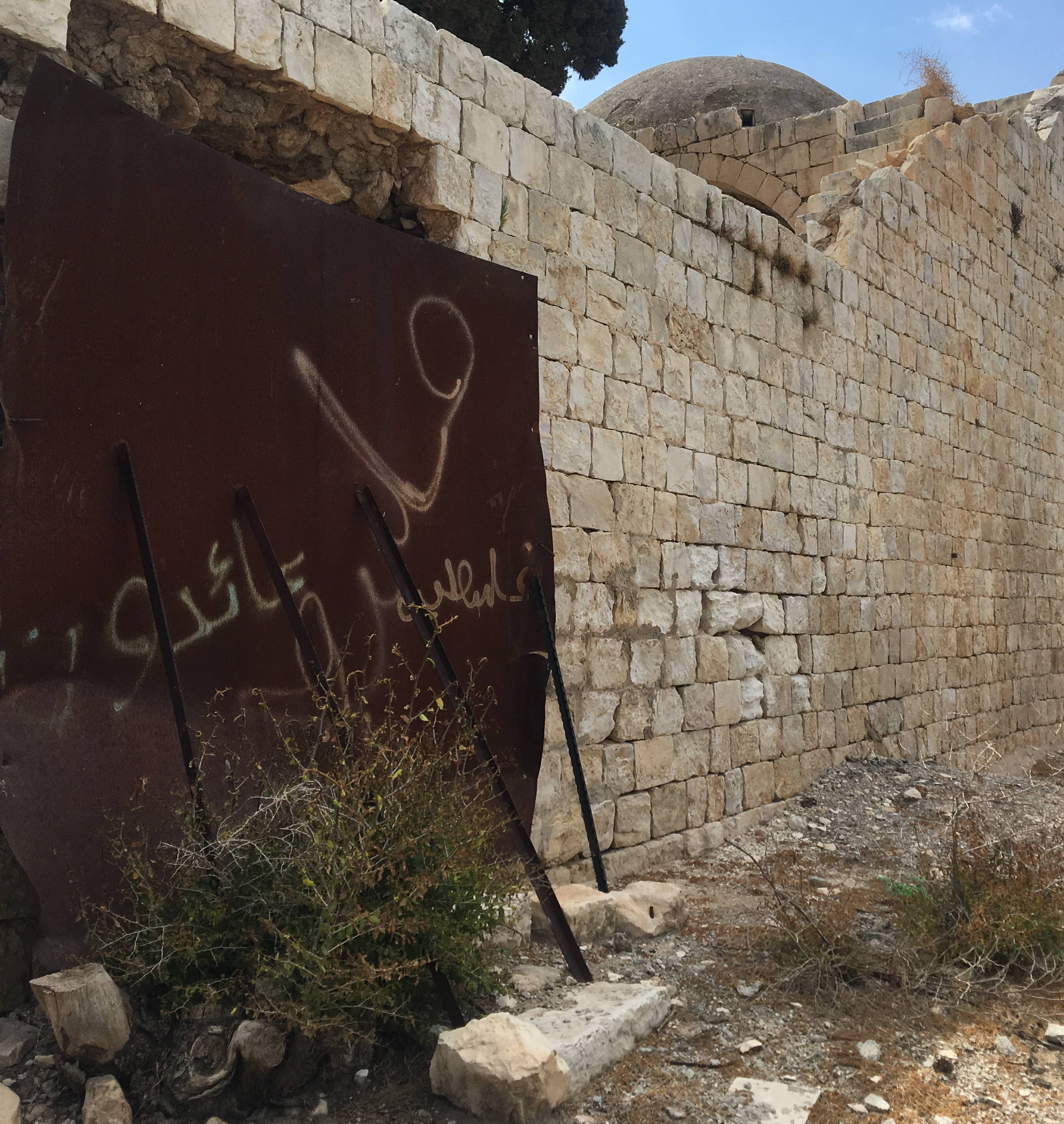 قرية الغابسيّة المهجّرة- فلسطين